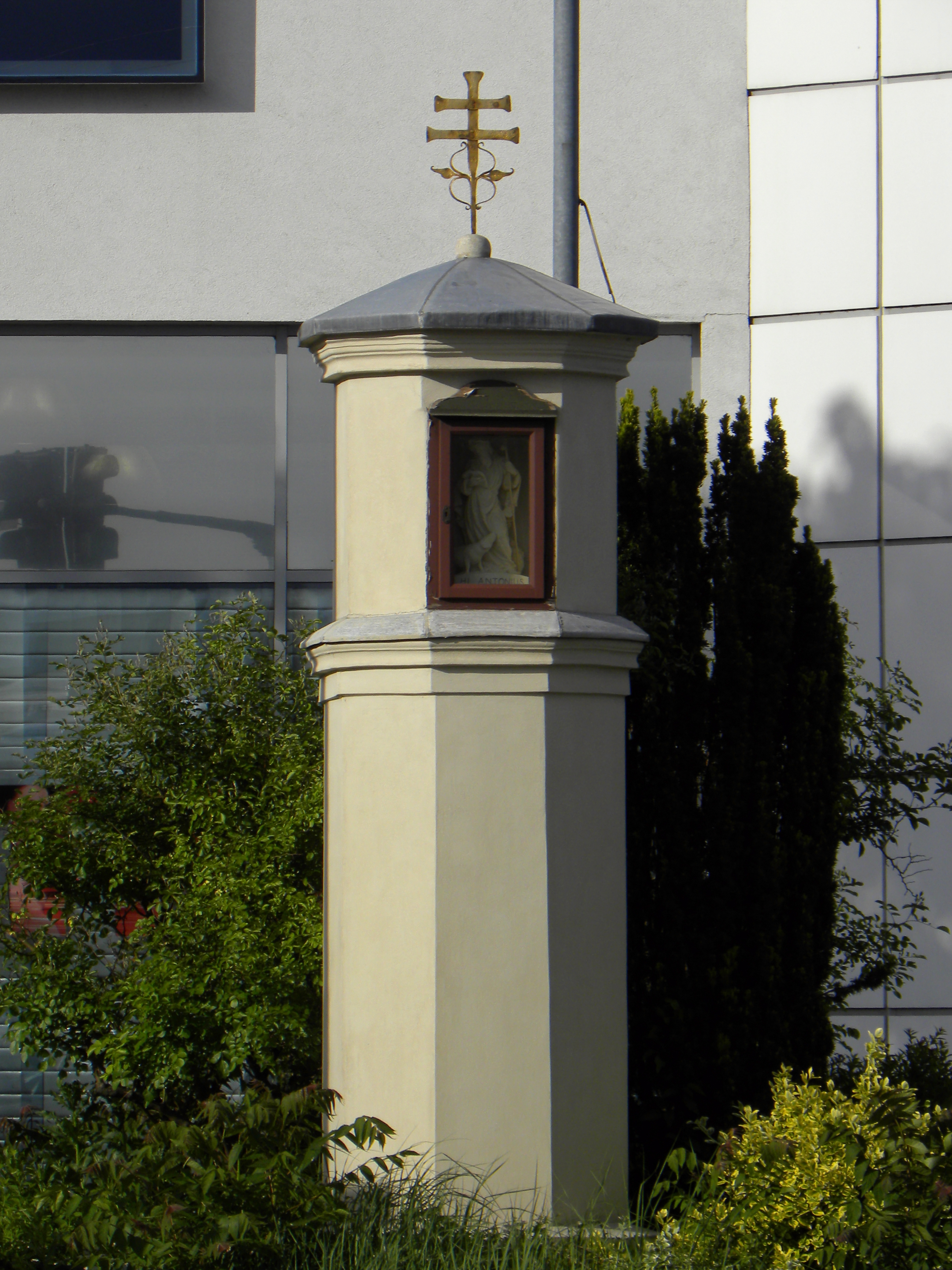 Breitpfeiler